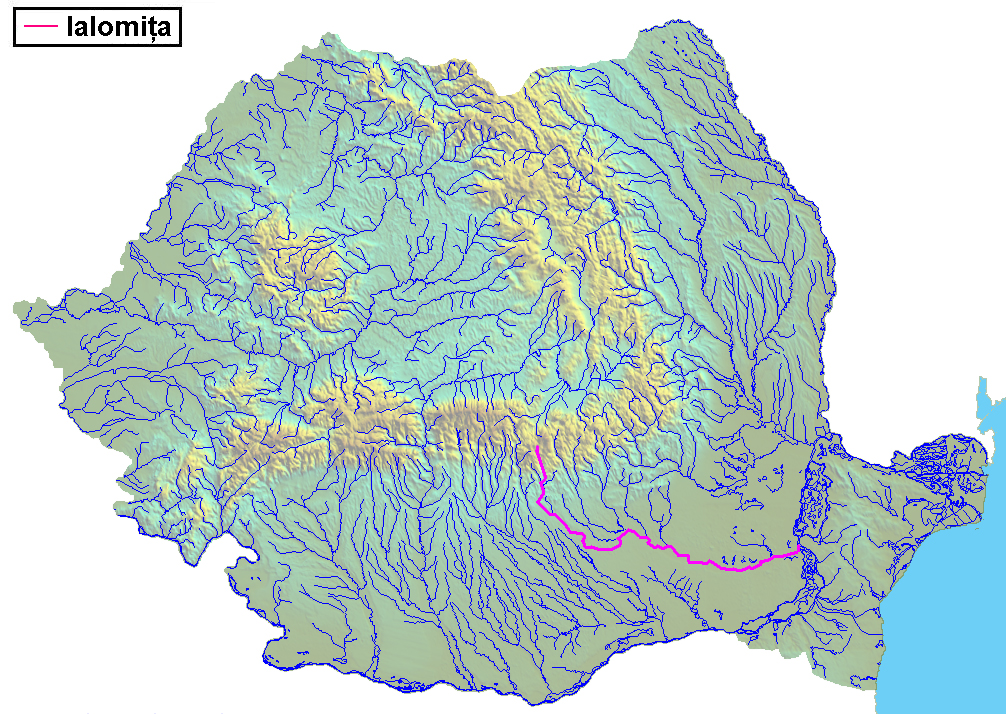 Raul Ialomita